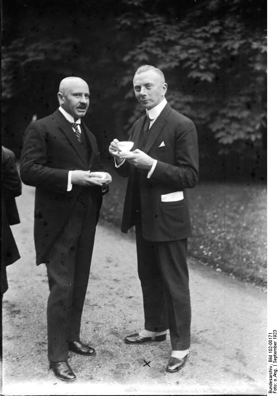 Gartenfest für Vertreter der Ausländischen Presse beim Reichskanzler Dr. Stresemann. Frhr. v. Rheinhaben, der neue Chef der Reichskanzlei und Vertrauter Dr. Stresemanns.